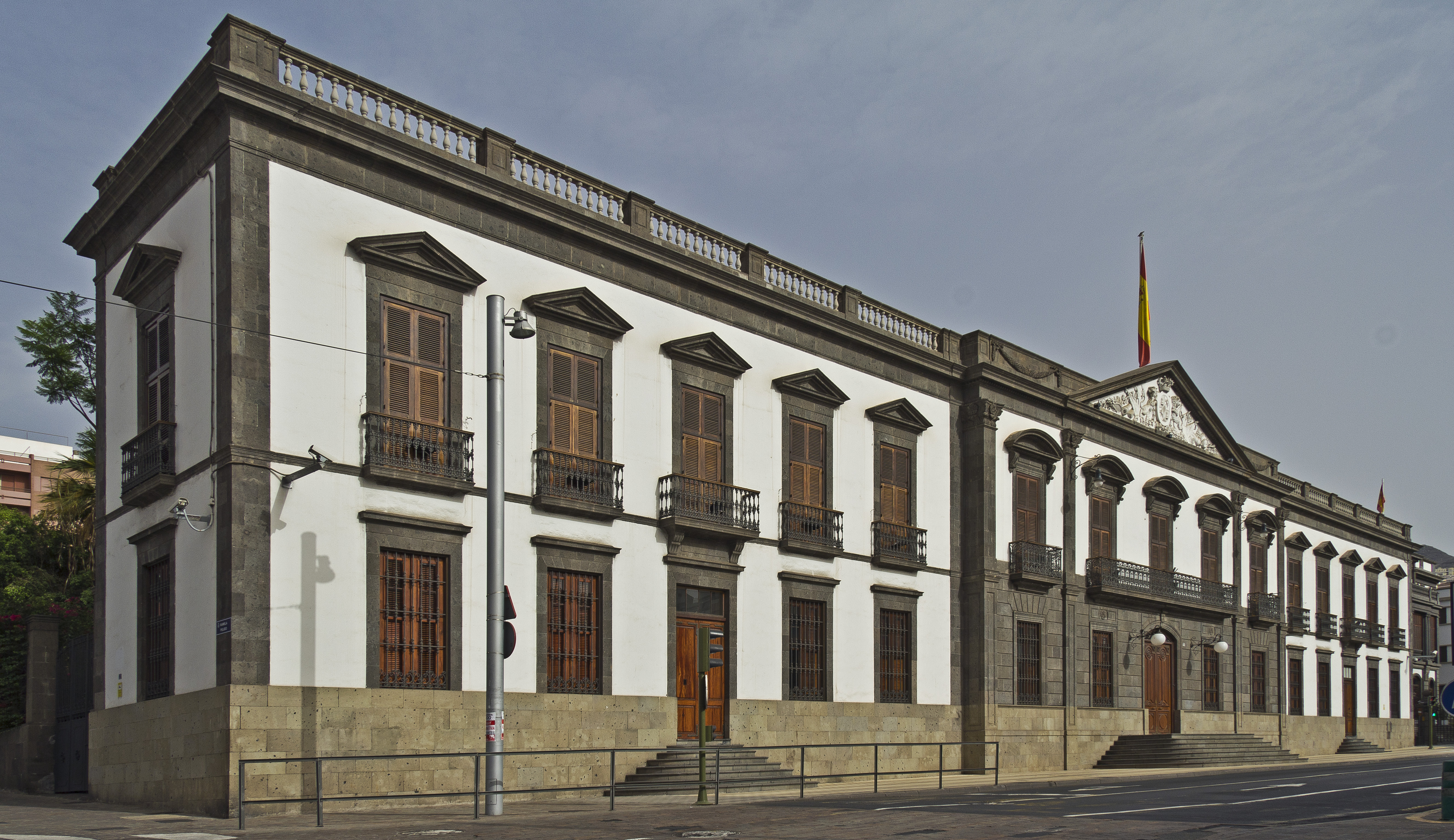 Der Palacio de la Capitanía General de Canarias an der Plaza Weyler in Santa Cruz de Tenerife wurde im Jahr 1880 fertiggestellt.